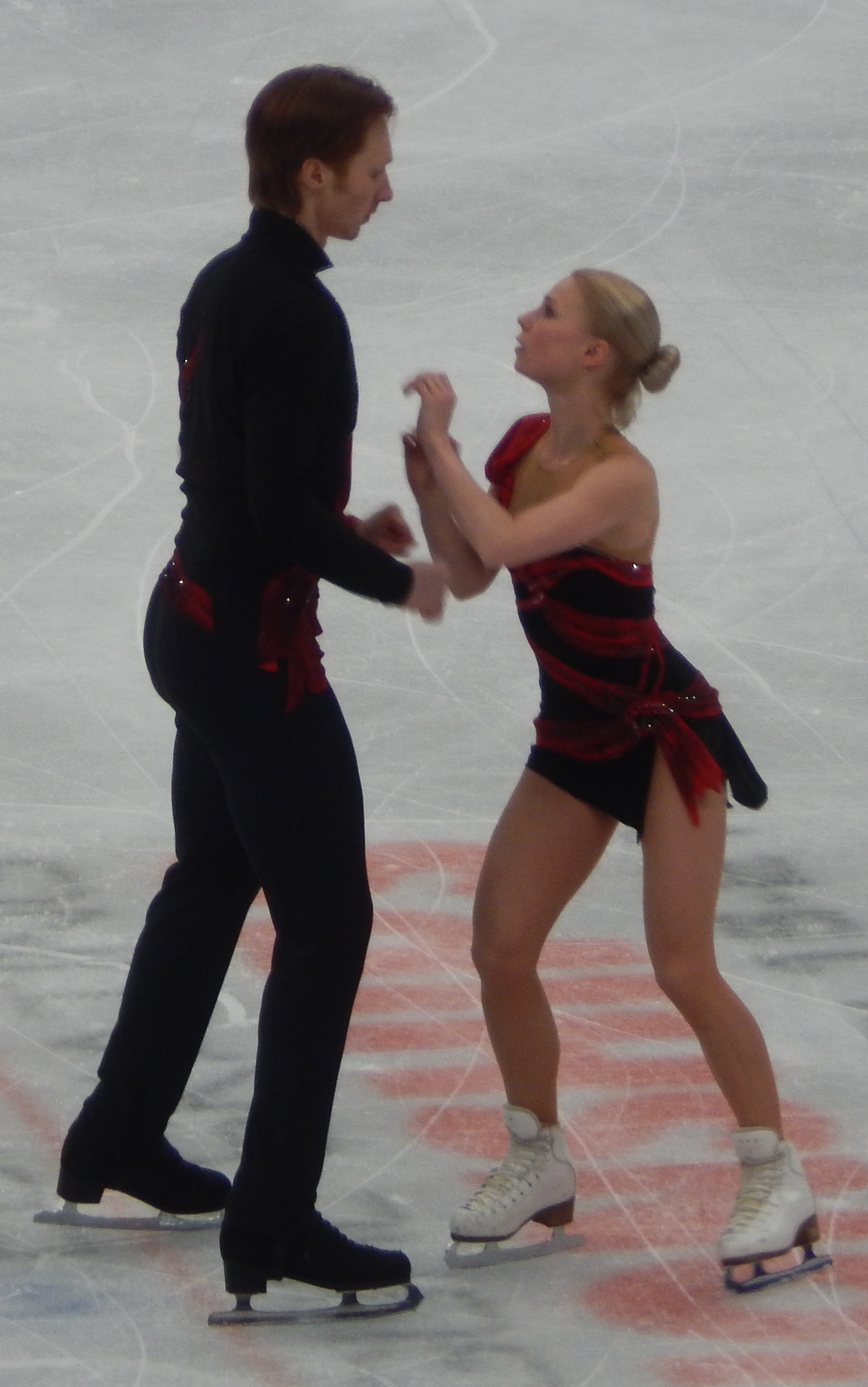 Чемпионат Европы по фигурному катанию 2018 в Москве. Первый день соревнований (17 января). Российская пара Евгения Тарасова и Владимир Морозов